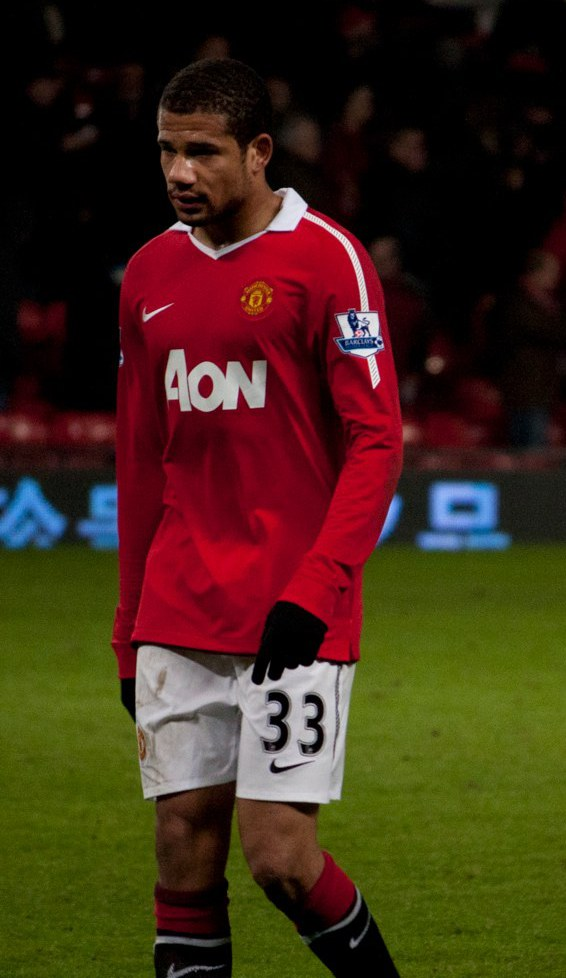 Tiago Manuel Correia Dias "Bebé"